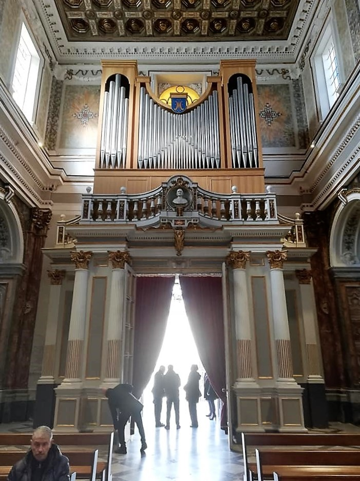 Controfacciata.